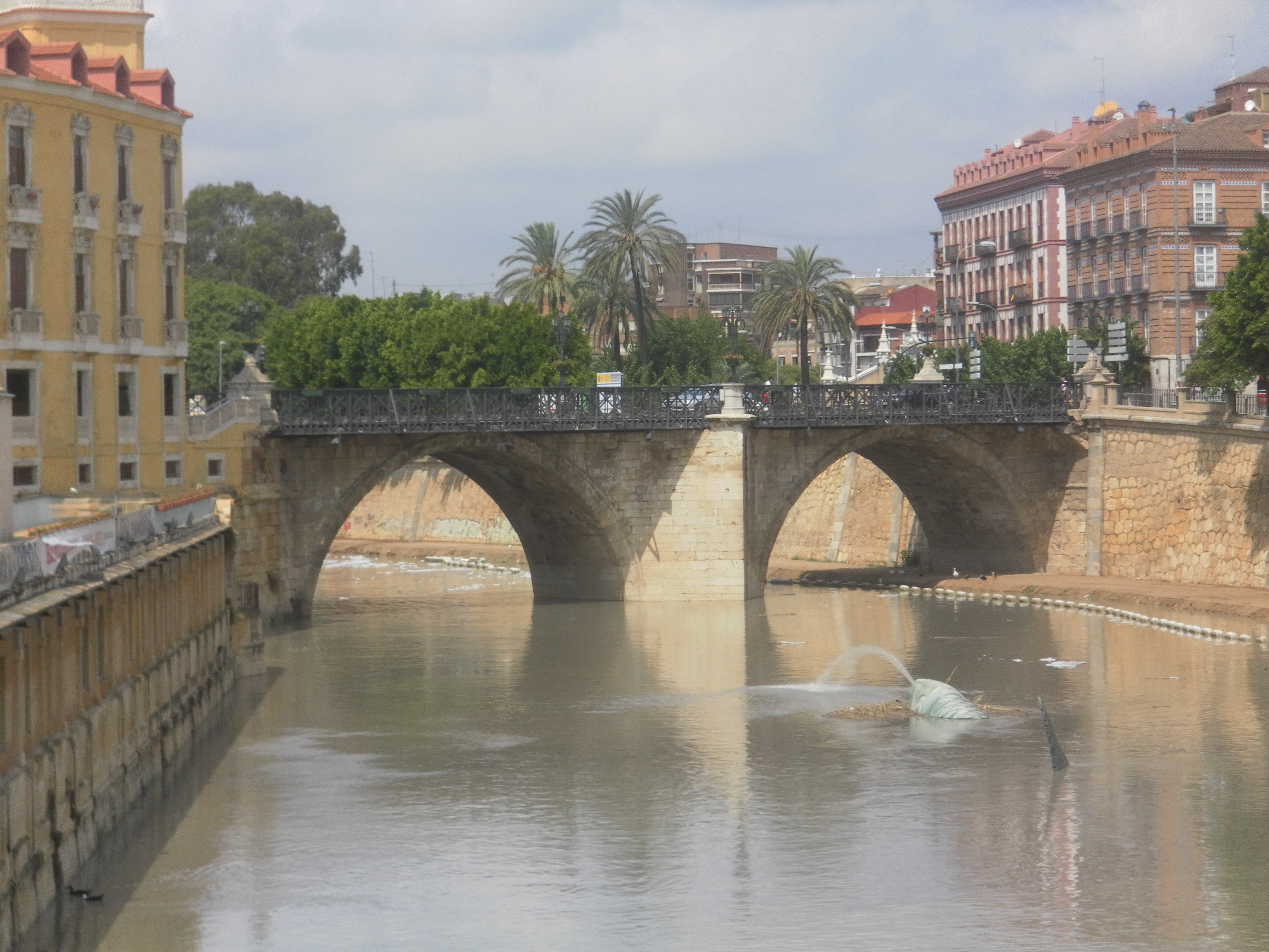 Imagen del Puente de los Peligros de Murcia (España). Siglo XVIII.